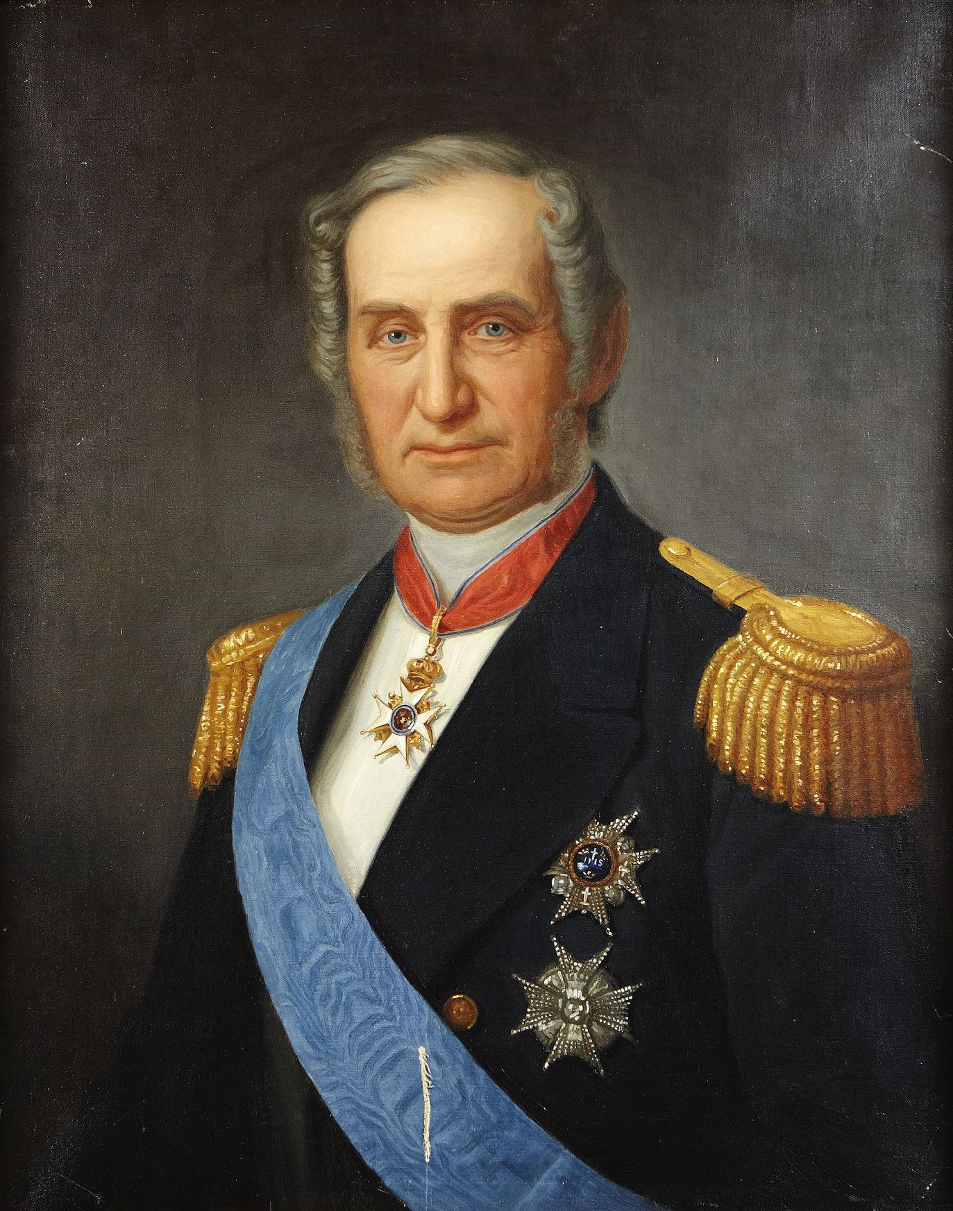 Greve Baltzar von Platen (1804-1875)